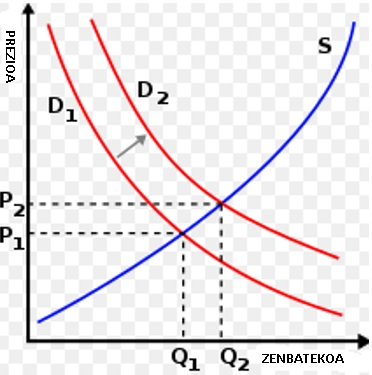 Lehia perfektua grafikoki irudikatuta